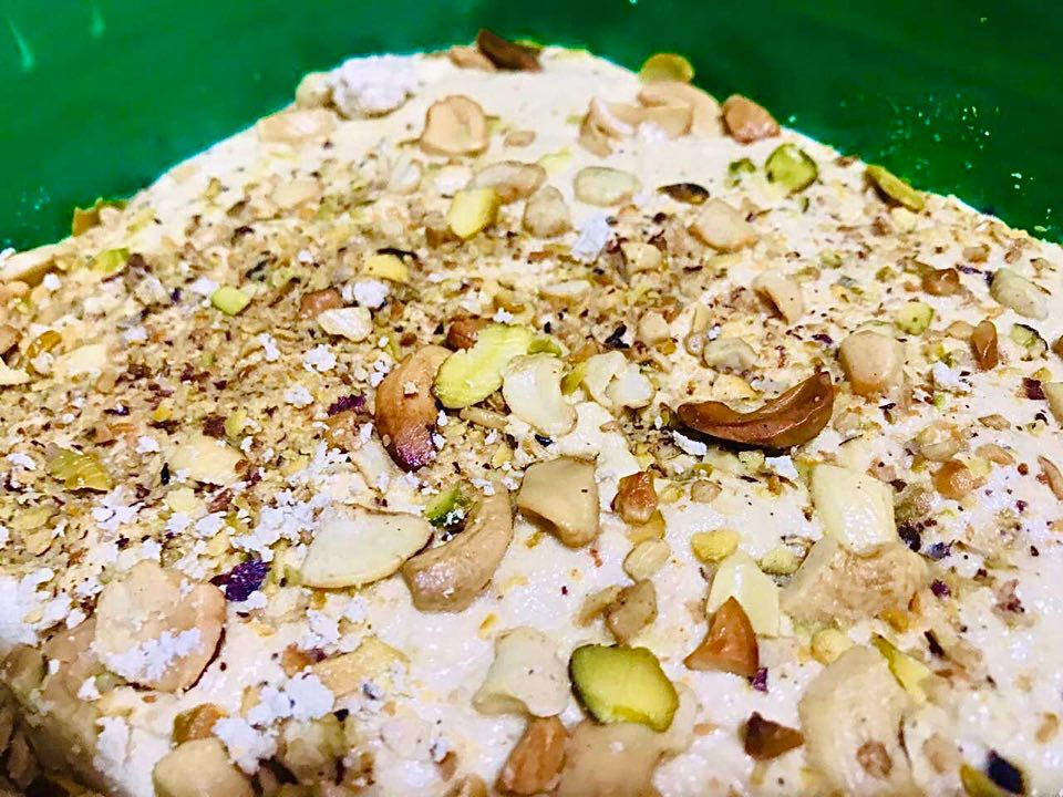 حلاوة شامية مصنوعة في الأردن ومزينة بمجموعة من المكسرات